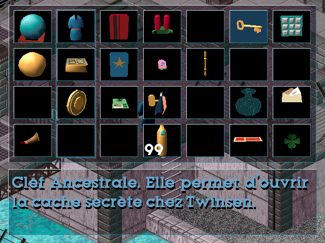 Capture d'écran du jeu vidéo Little Big Adventure (1994), développé par Adeline Software International.